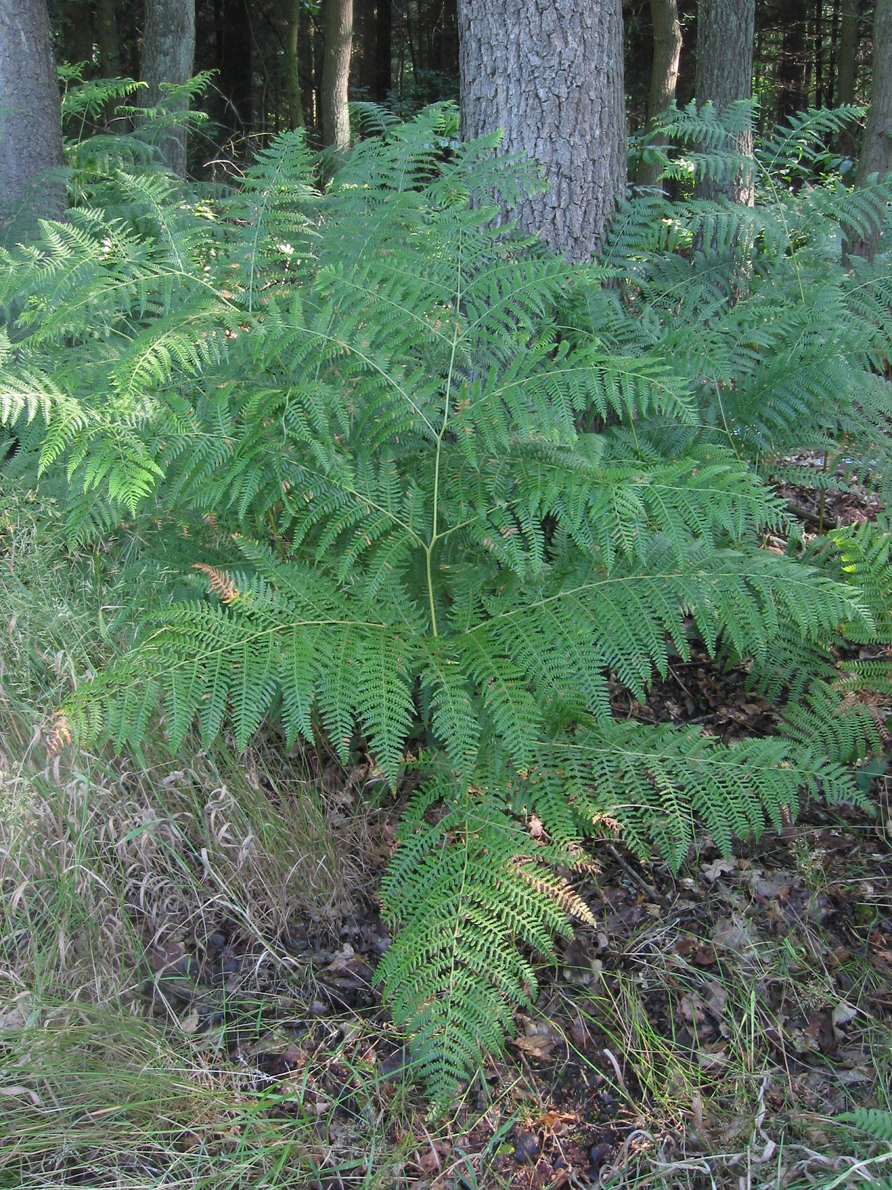 (nl: Adelaarsvaren plant) Pteridium aquilinum